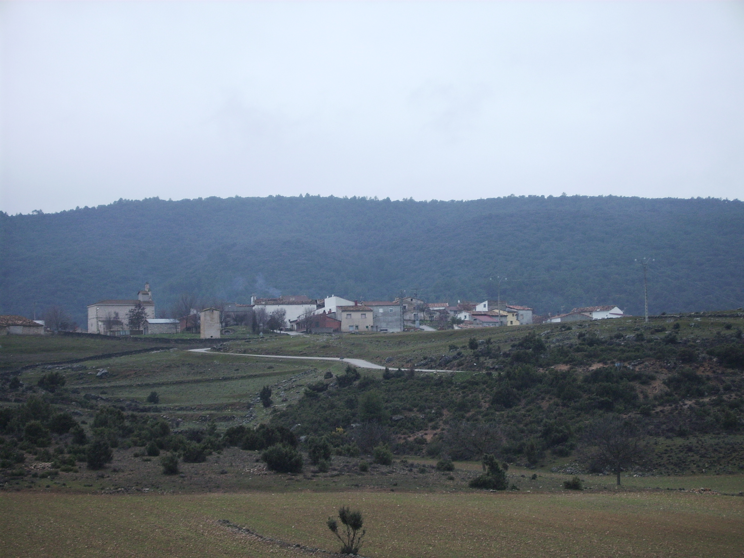 Imagen panorámica de Valtablado del Río (Guadalajara).